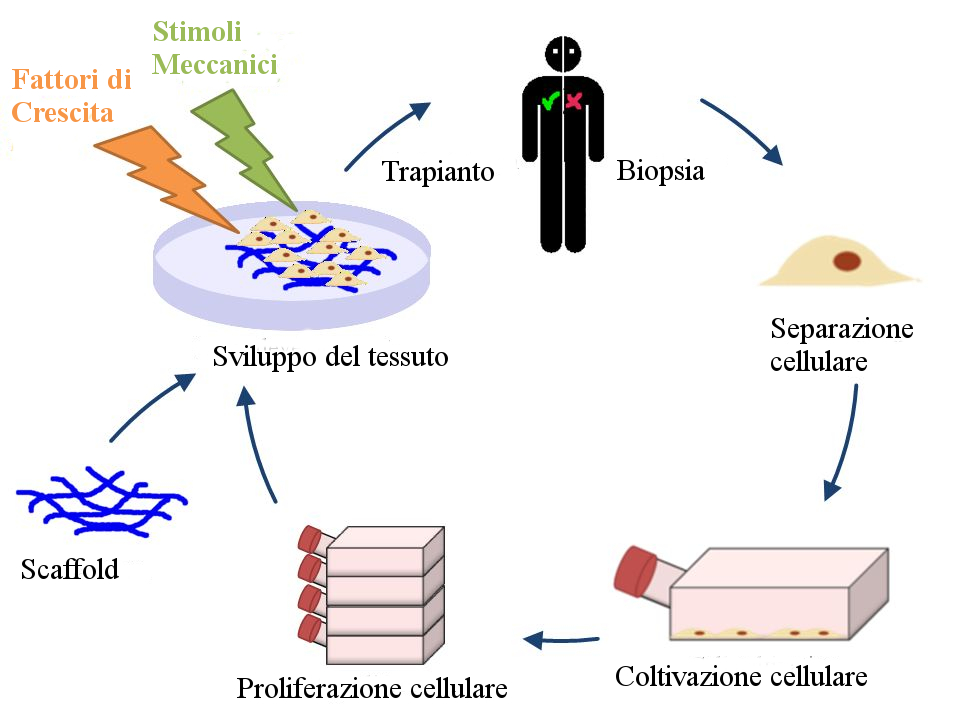 processo dell'ingegneria tissutale